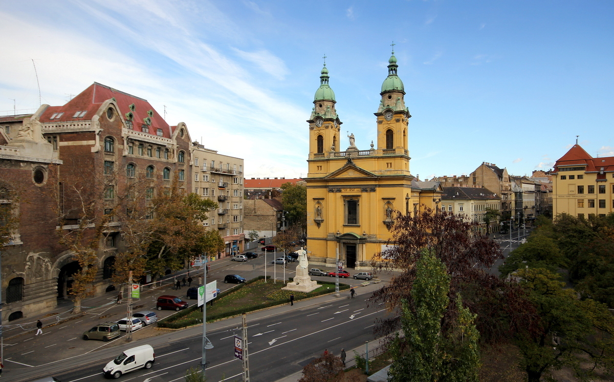 Budapest, Józsefvárosi Szent József r. k. templom